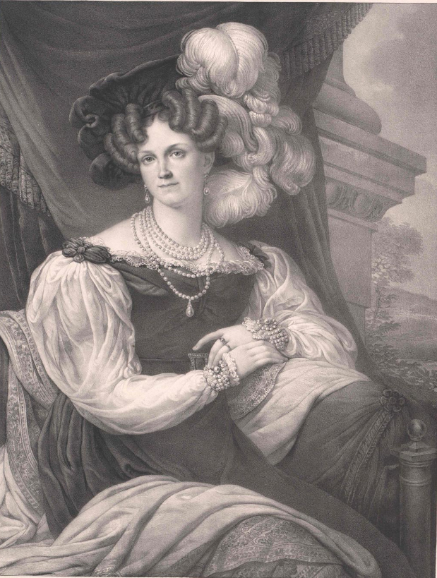 Princesa Guilhermina de Baden